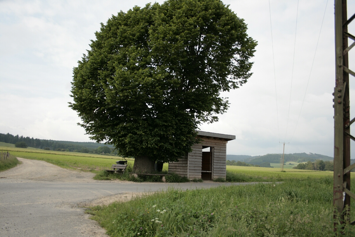 Uralte Linde in Hespecke (Lennestadt) Umfang 400cm